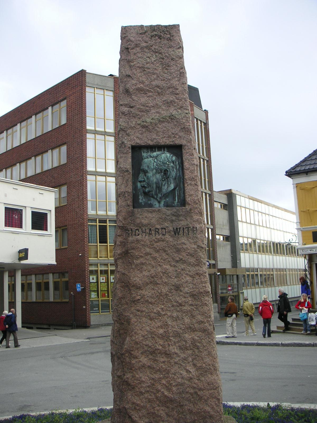 Denkmal zu Ehren von Richard With in Tromsø